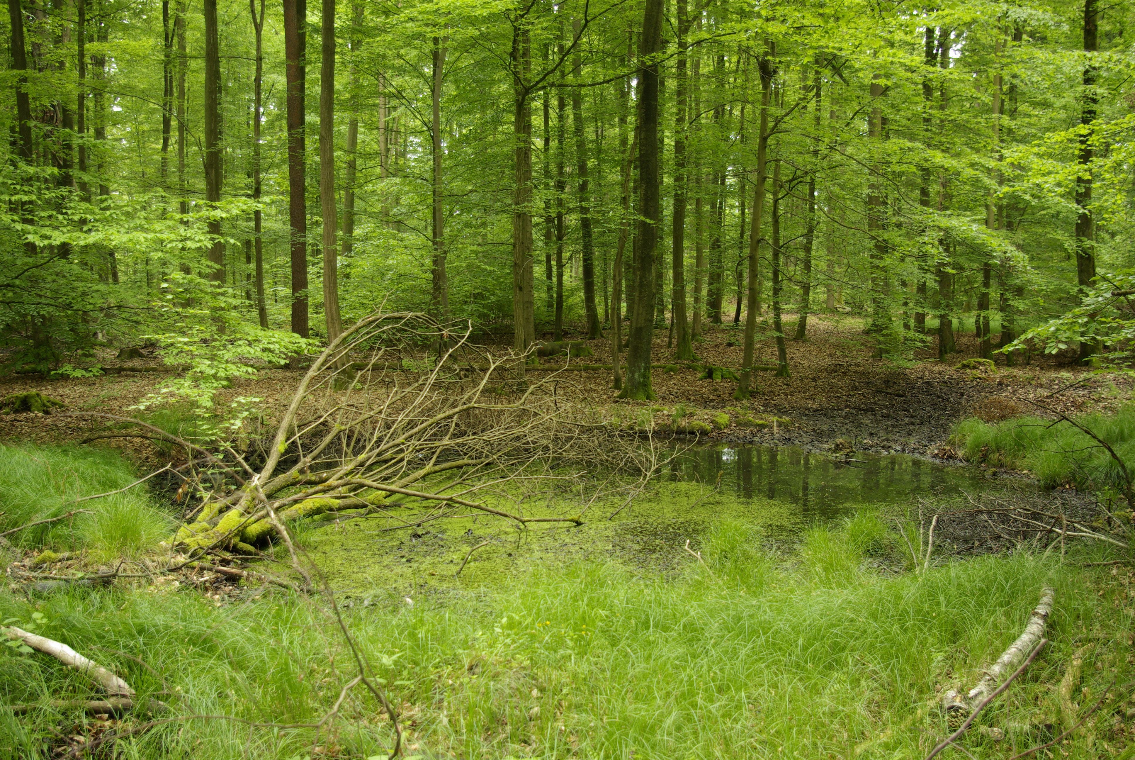 Geschützter Landschaftsbestandteil Der Hohe Buchene Wald im Ebracher Forst im Steigerwald